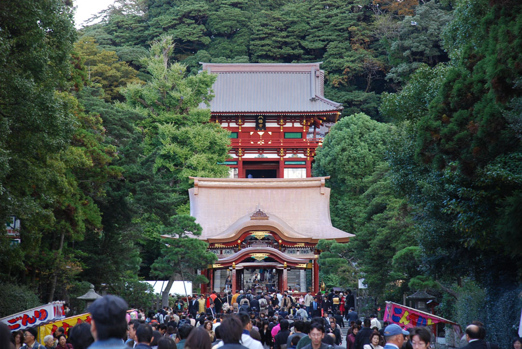 鶴岡八幡宮です。どうも七五三とかぶったようで人大杉。